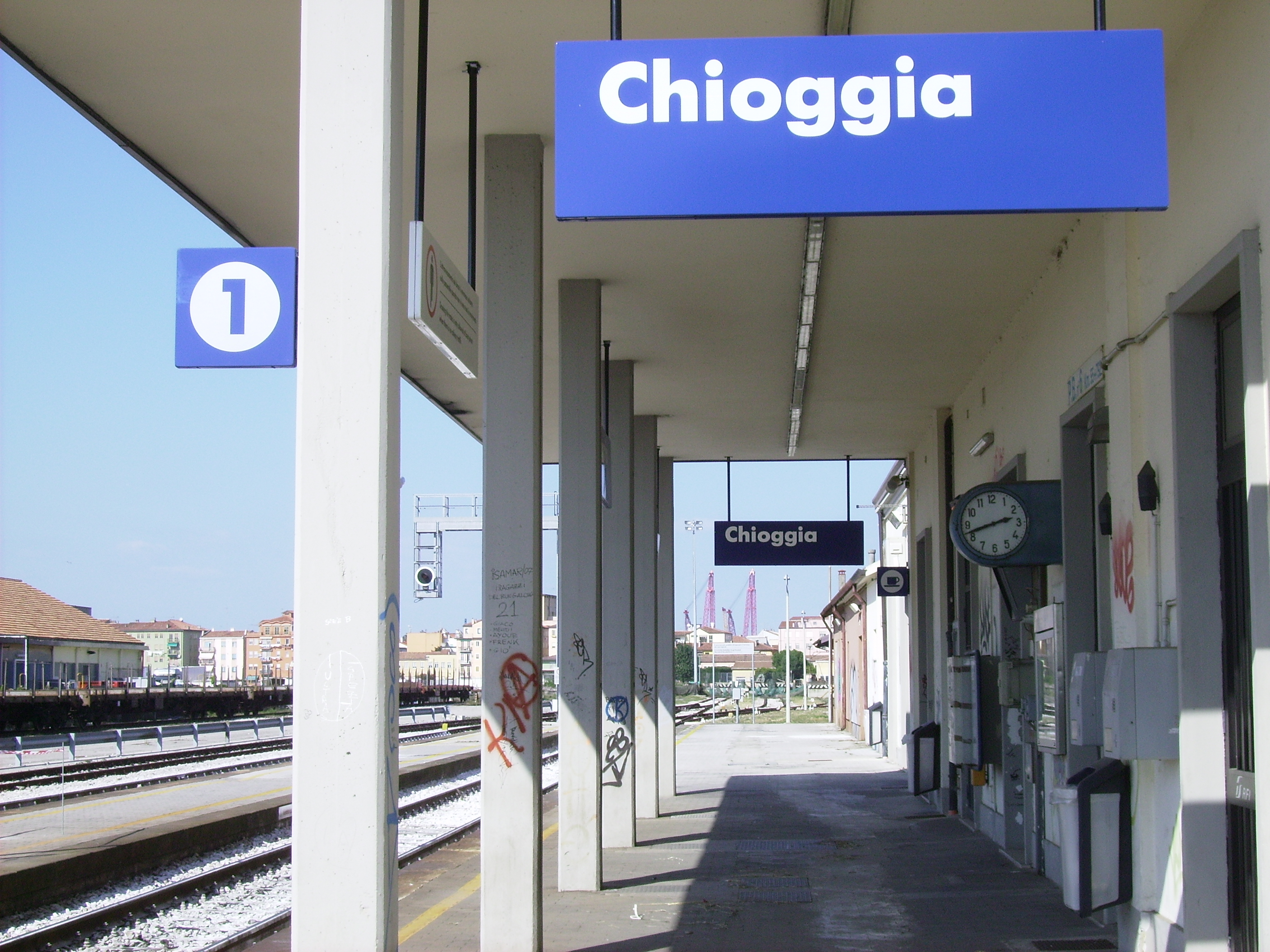 Pensilina presso il primo binario della stazione di Chioggia.